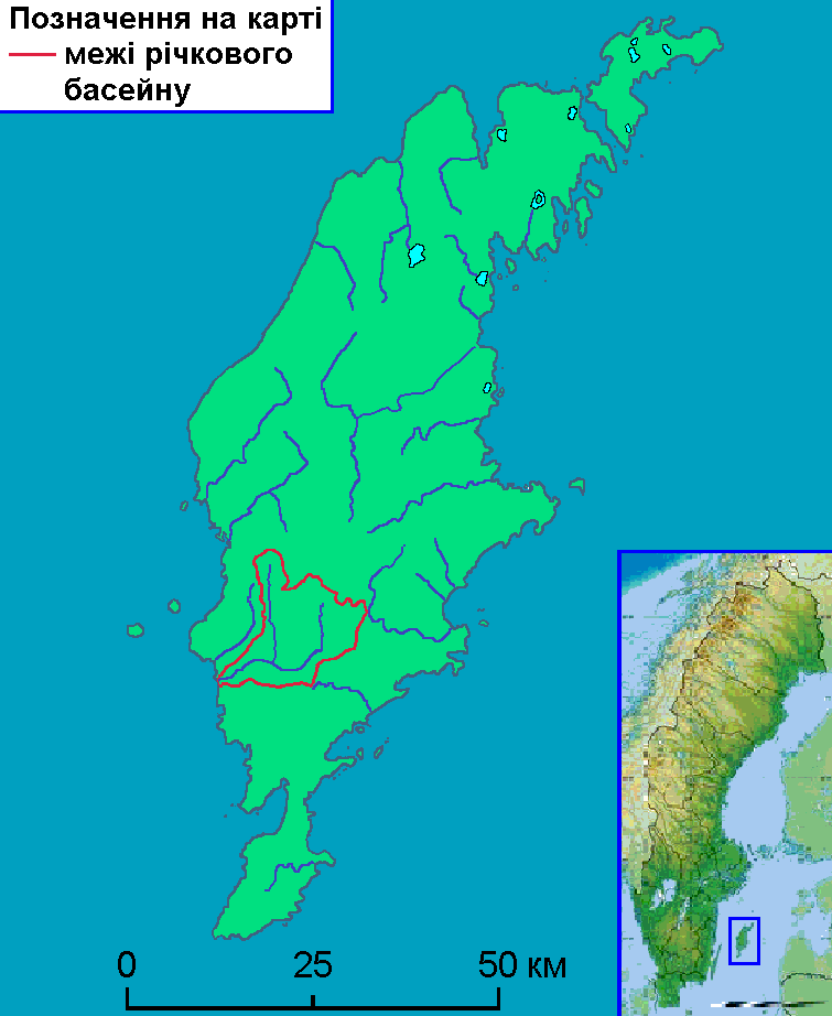 Карта річки Снудерон на острові Готланд у Швеції. Створено на основі карти річок лену Готланд Gotlands län на сайті SMHI Шведського інституту метеорології та гідрології. Використано карту File:Sweden relief location map.jpg.